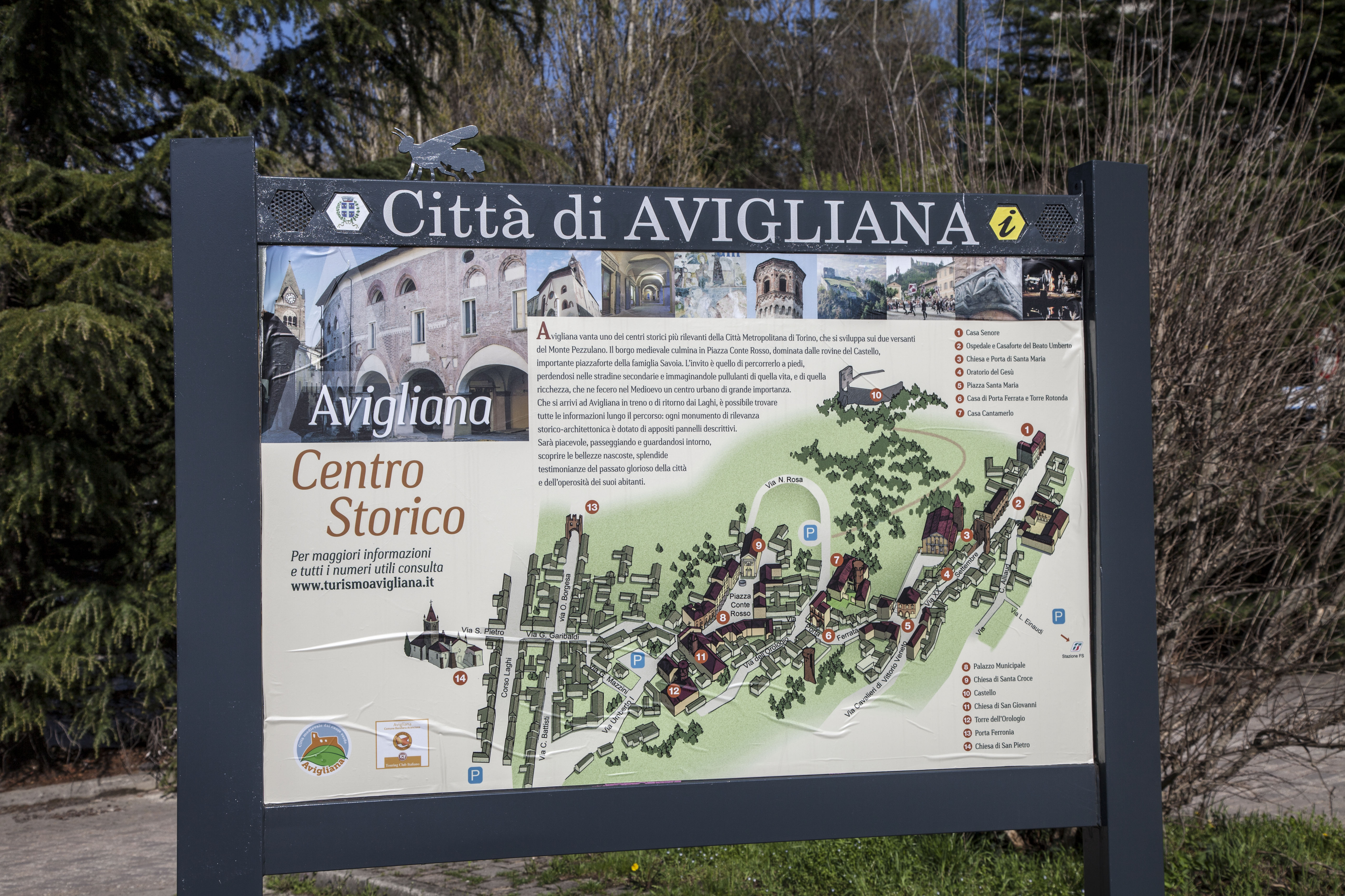 מפה של העיר